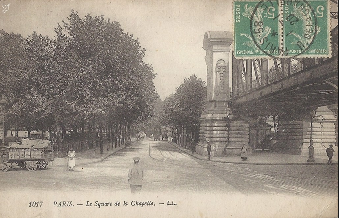 Square Louise-de-Marillac, anciennement square de la Chapelle. Paris XVIIIè arrondissement.